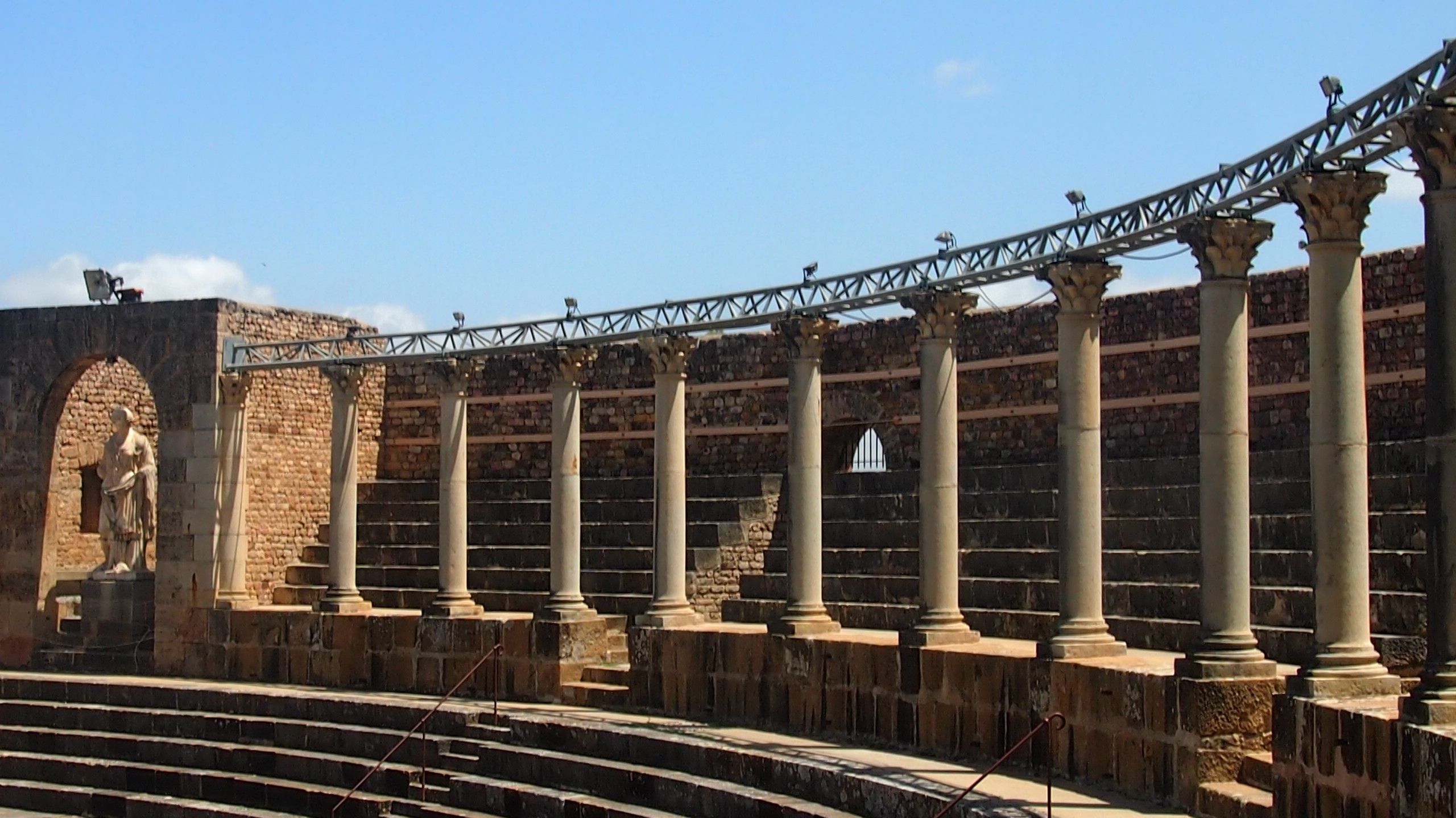 Restes de théâtre et Thermes